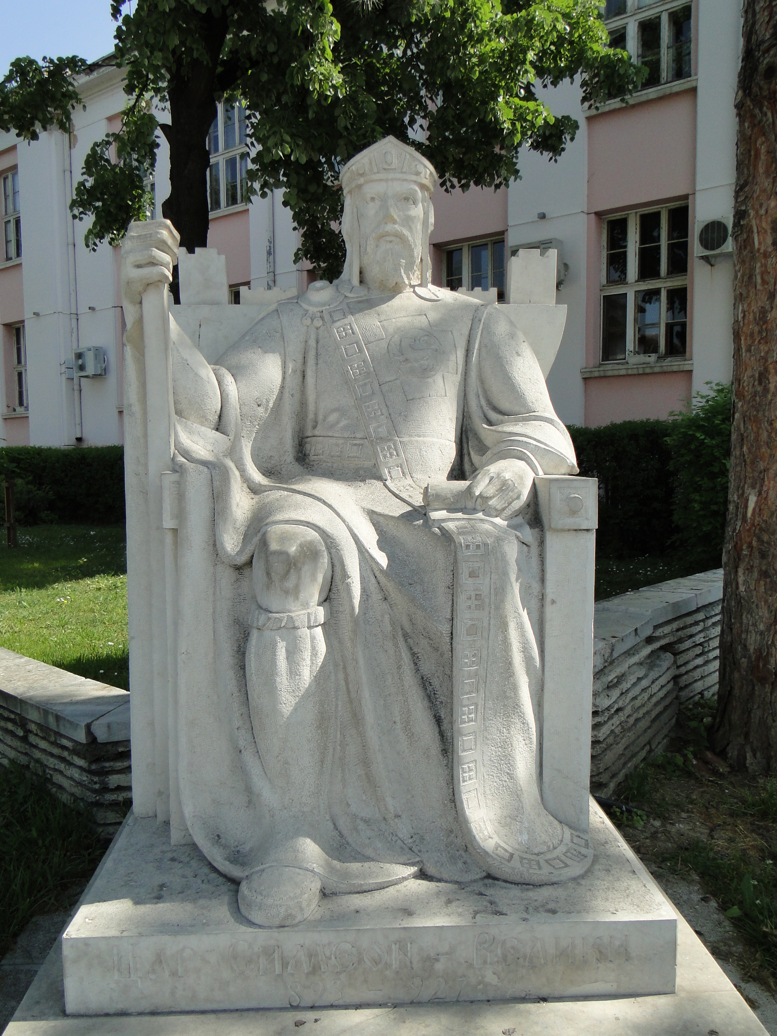 Видин, май 2013